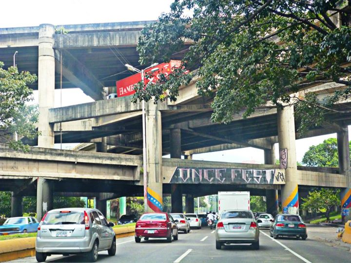 Distribuidor vial "La Araña". Caracas, Venezuela.